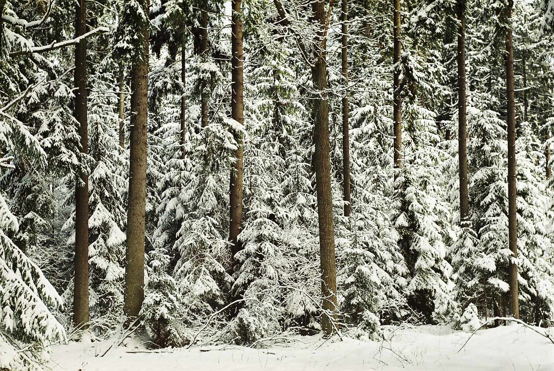 Autor: Adrian Grzegorz Rok wykonania: 2005